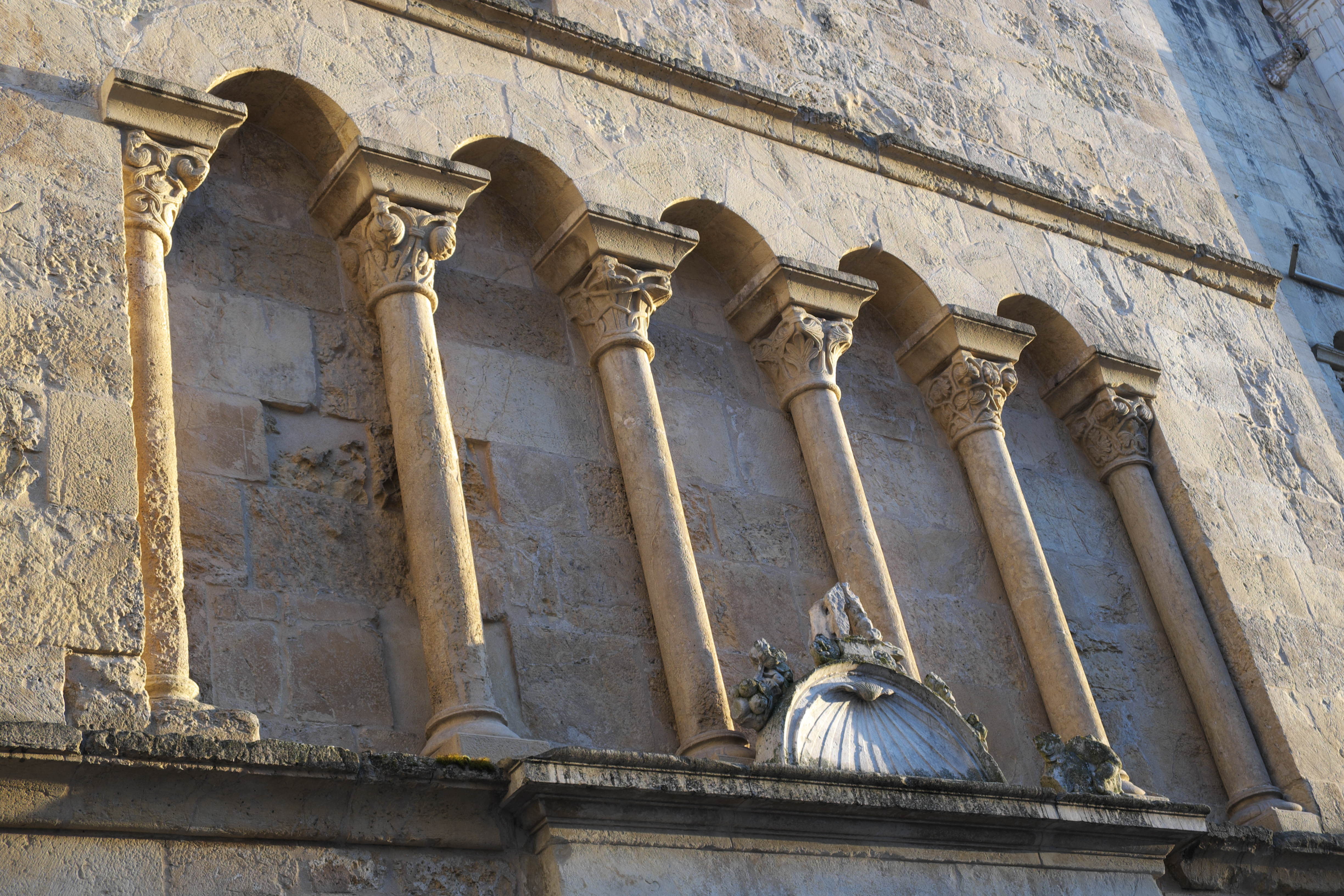 Alte Kathedrale Sé Velha in Coimbra in Portugal, Arkaden der nördlichen Querhausfassade